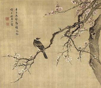 Bird on a tree